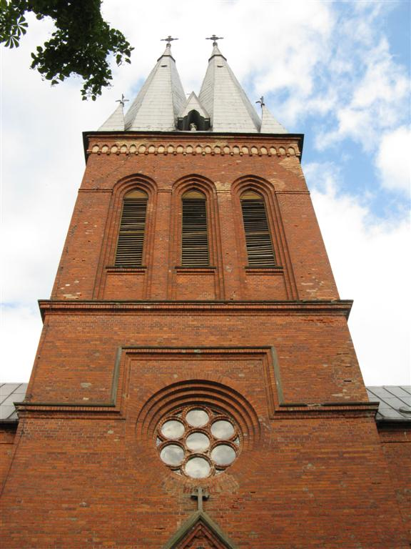 Panemunėlio Šv. Juozapo Globos bažnyčia